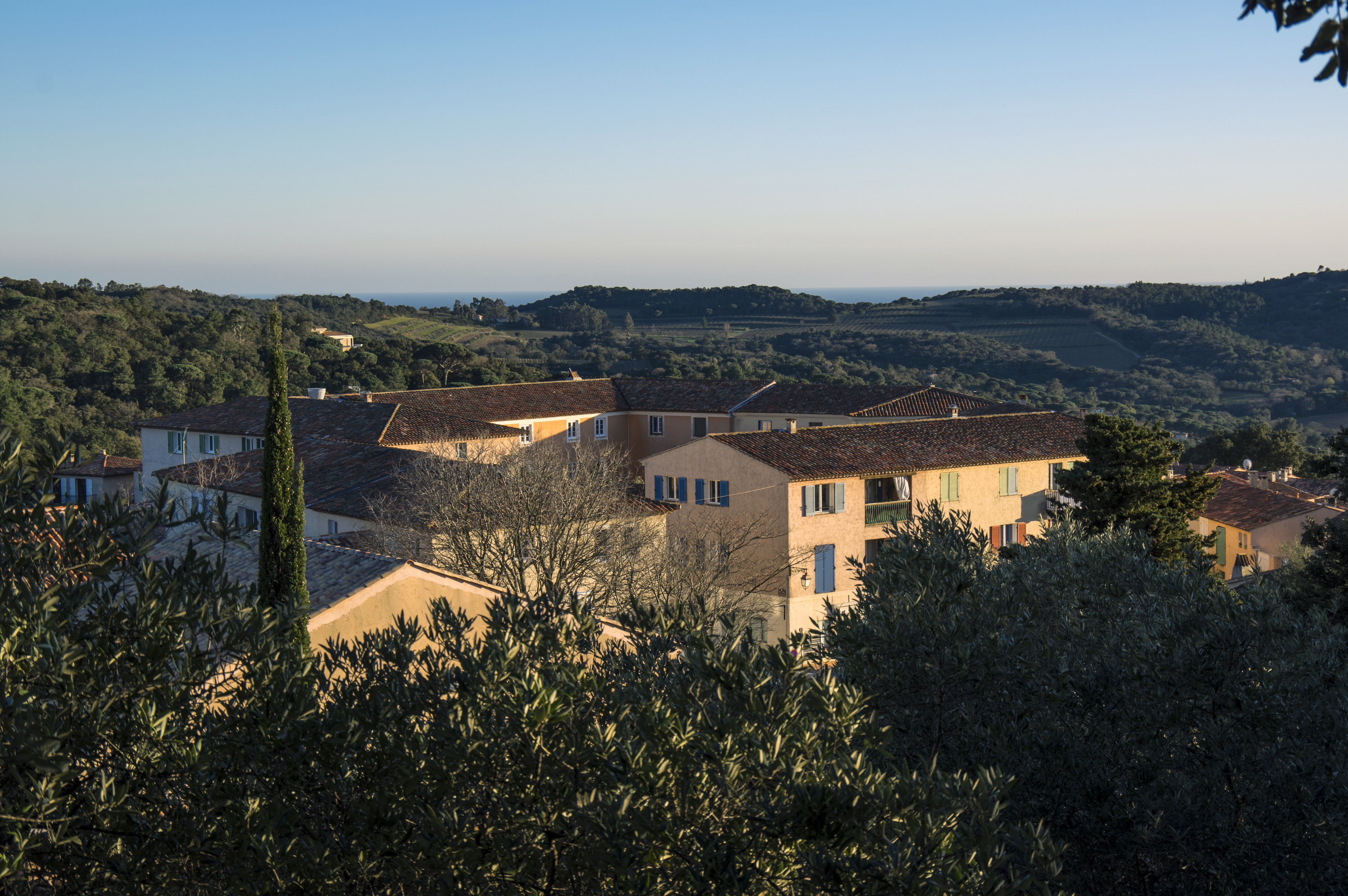 Vue du nouveau village de Gassin vers le sud